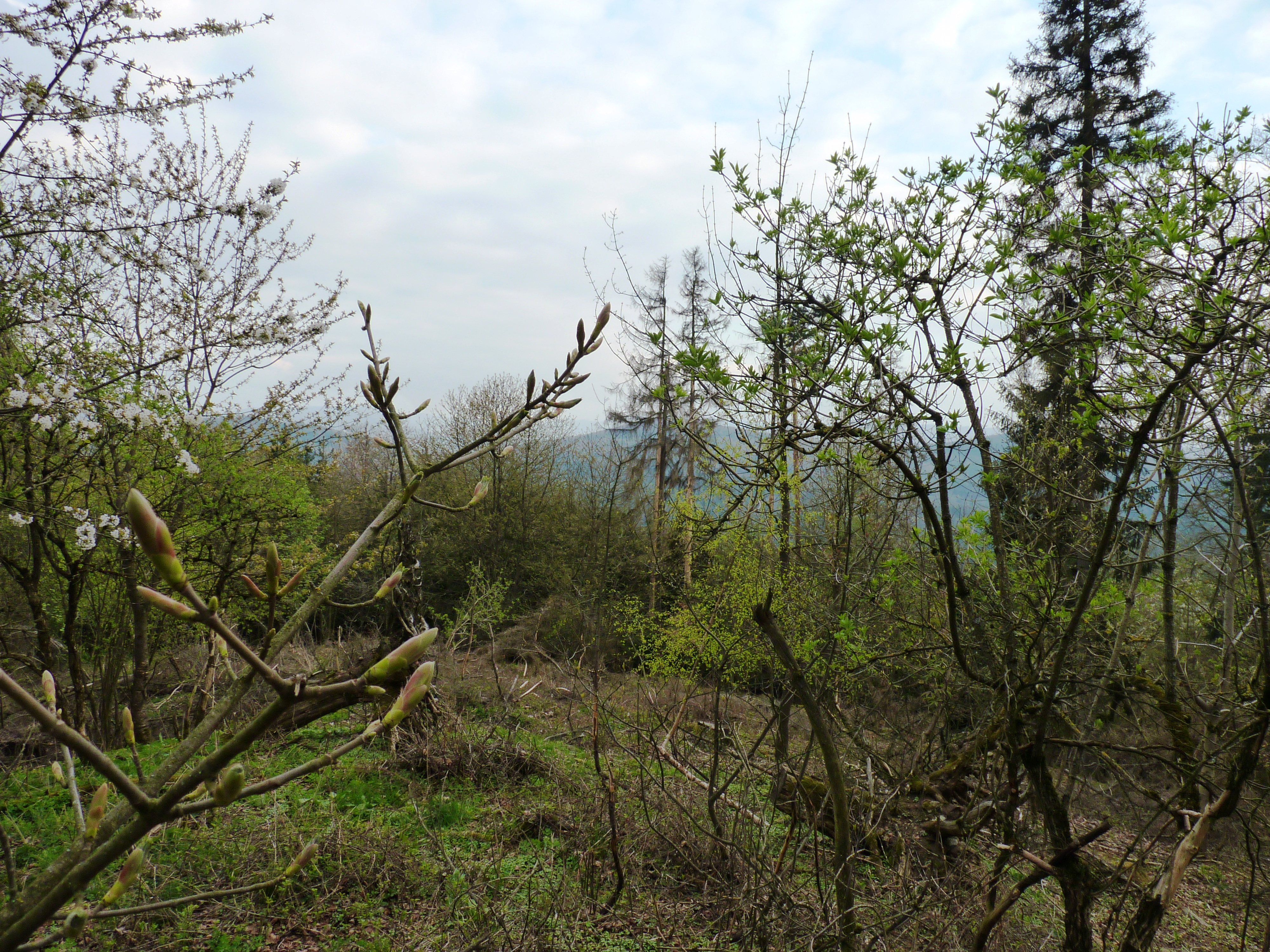 Památkově chráněný vrchol Německé hory.